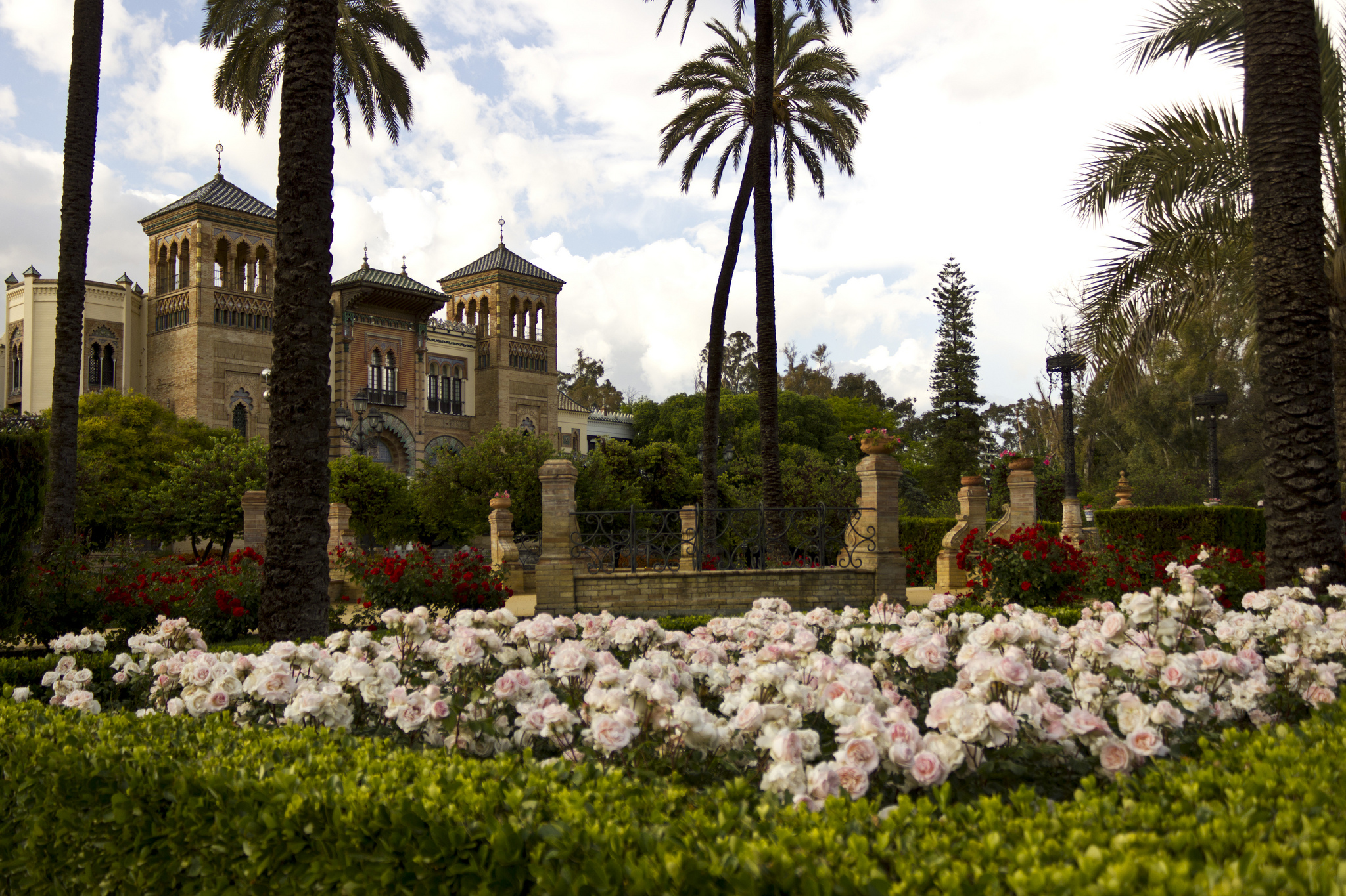 Parque de María Luisa, Sevilla